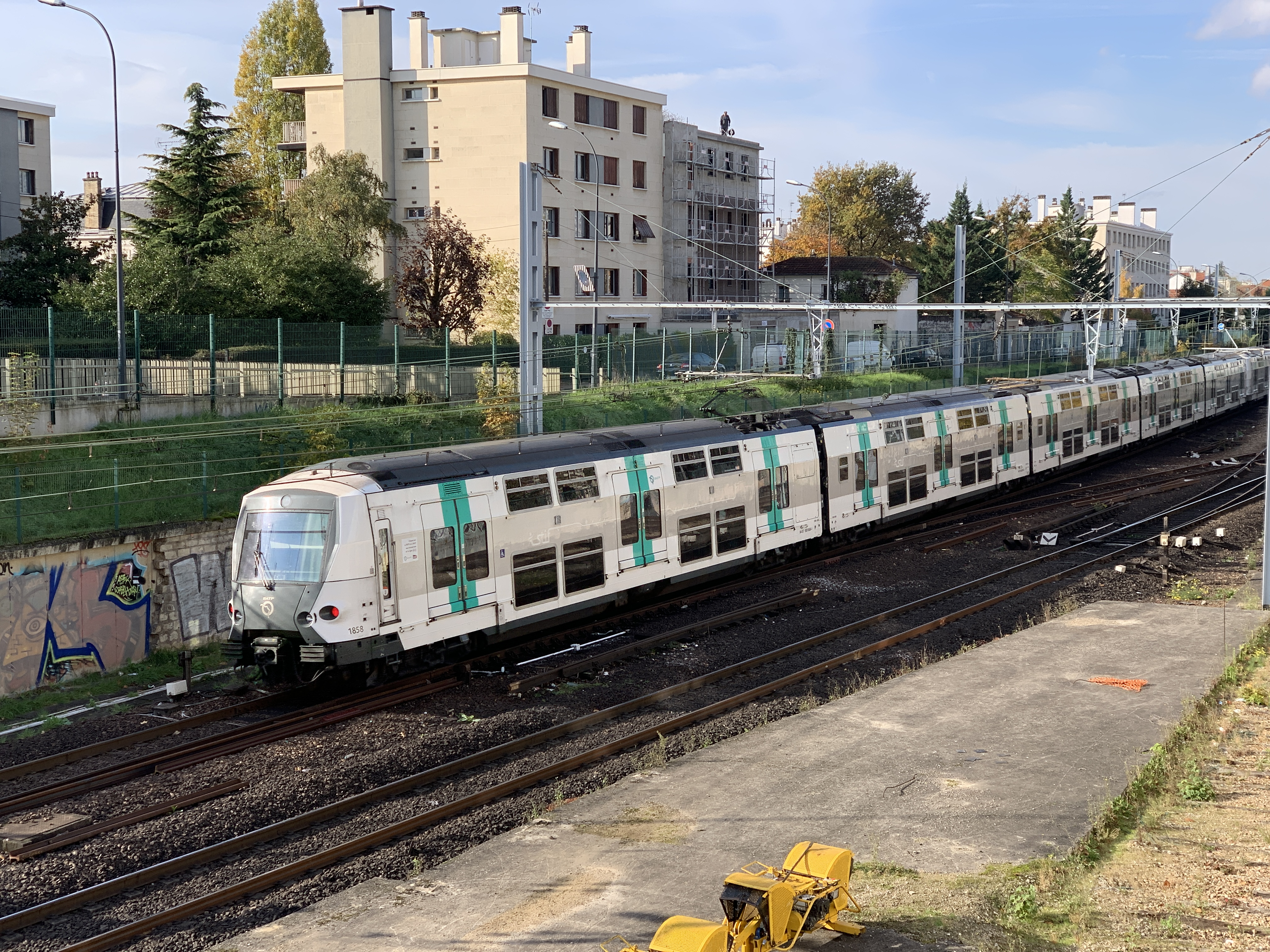 Train MI09 sur la ligne A du RER près de la gare de Fontenay-sous-Bois.